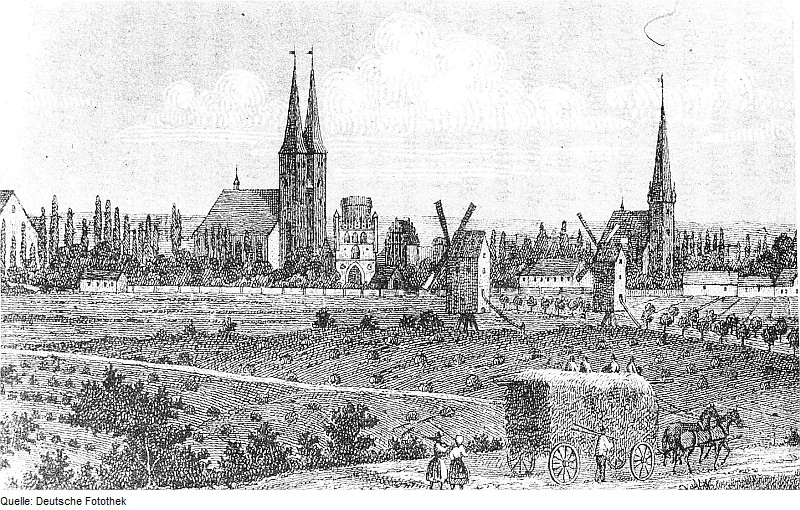 Original image description from the Deutsche Fotothek Stendal. Stadtansicht, 19. Jh., Ausschnitt, aus: Goetze, Ludwig: Urkundliche Geschichte der Stadt Stendal, 1873